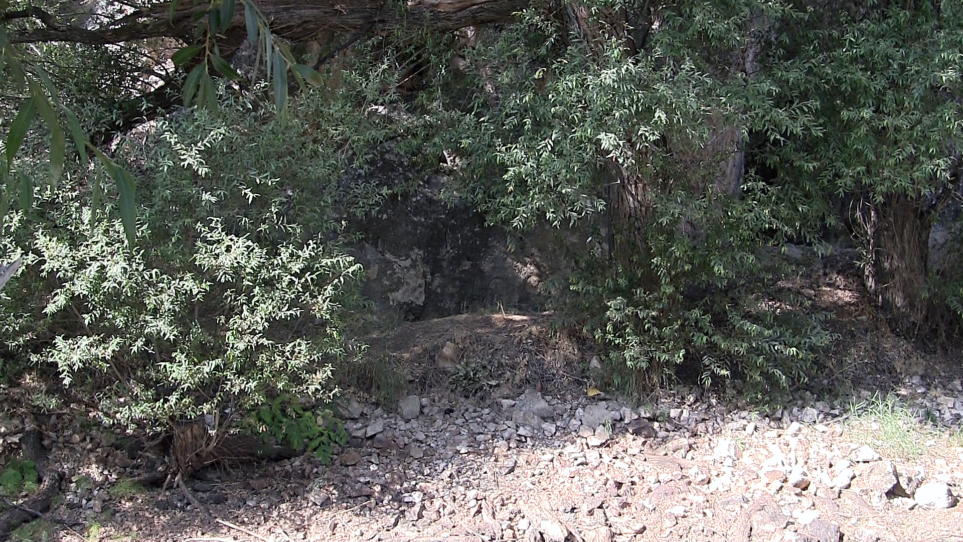 Taşçı A, hethitisches Felsrelief nahe Develi, Zentraltürkei